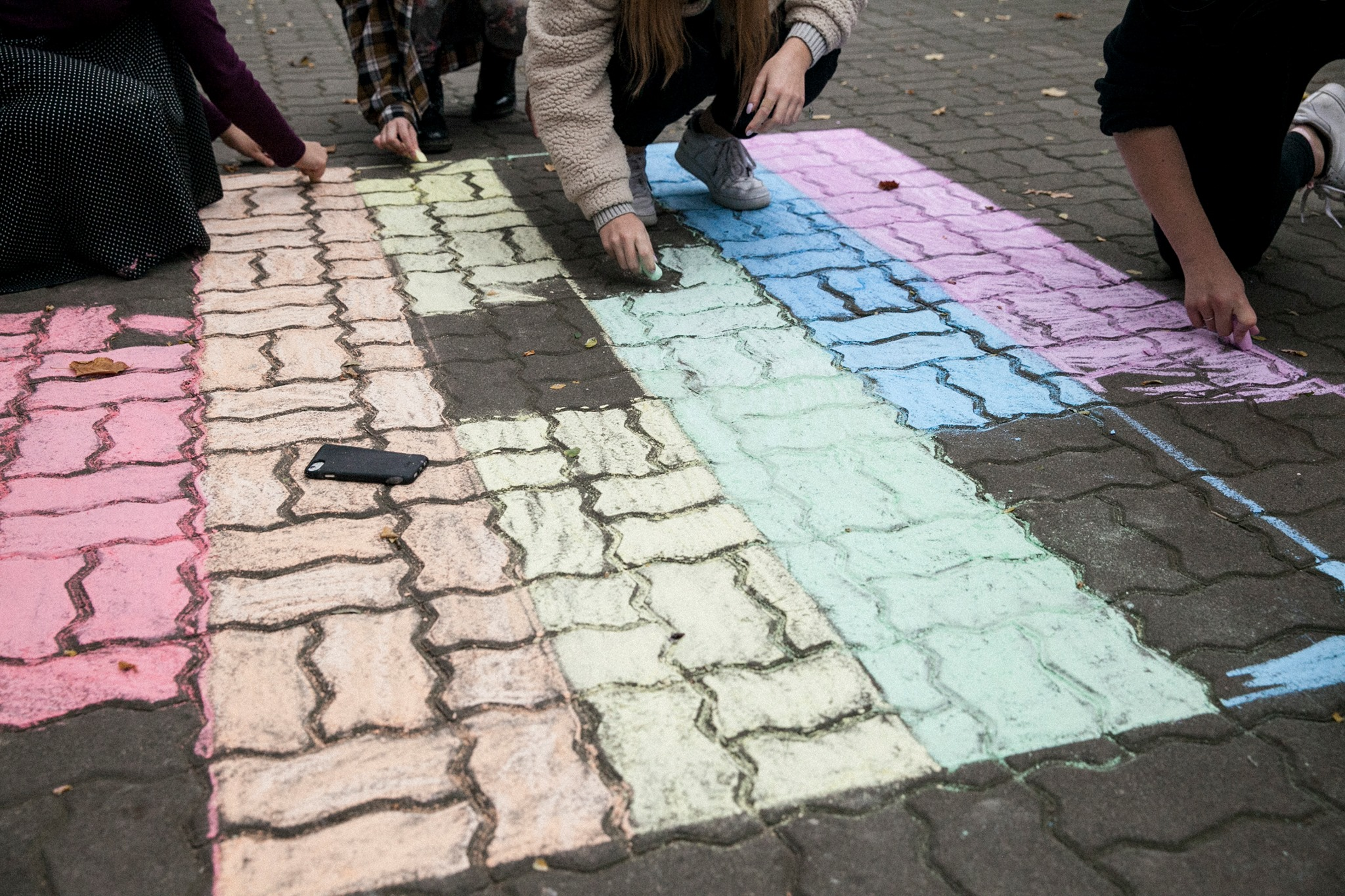 Malowanie kredą flagi LGBT podczas Tęczowego Piątku